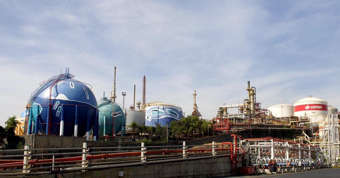 Instalaciones Refinería "Tenerife"